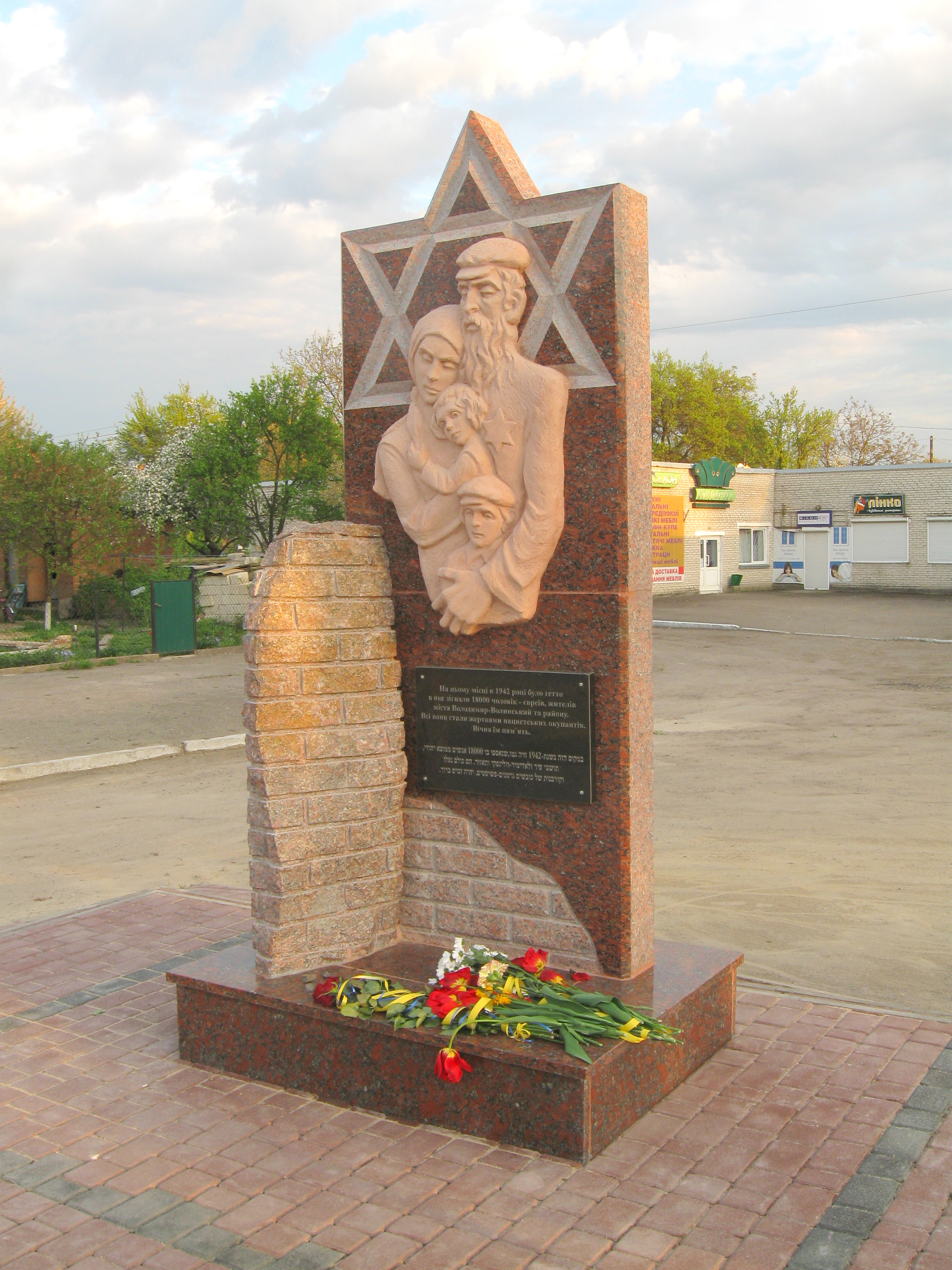 Граніт, кольоровий бетон